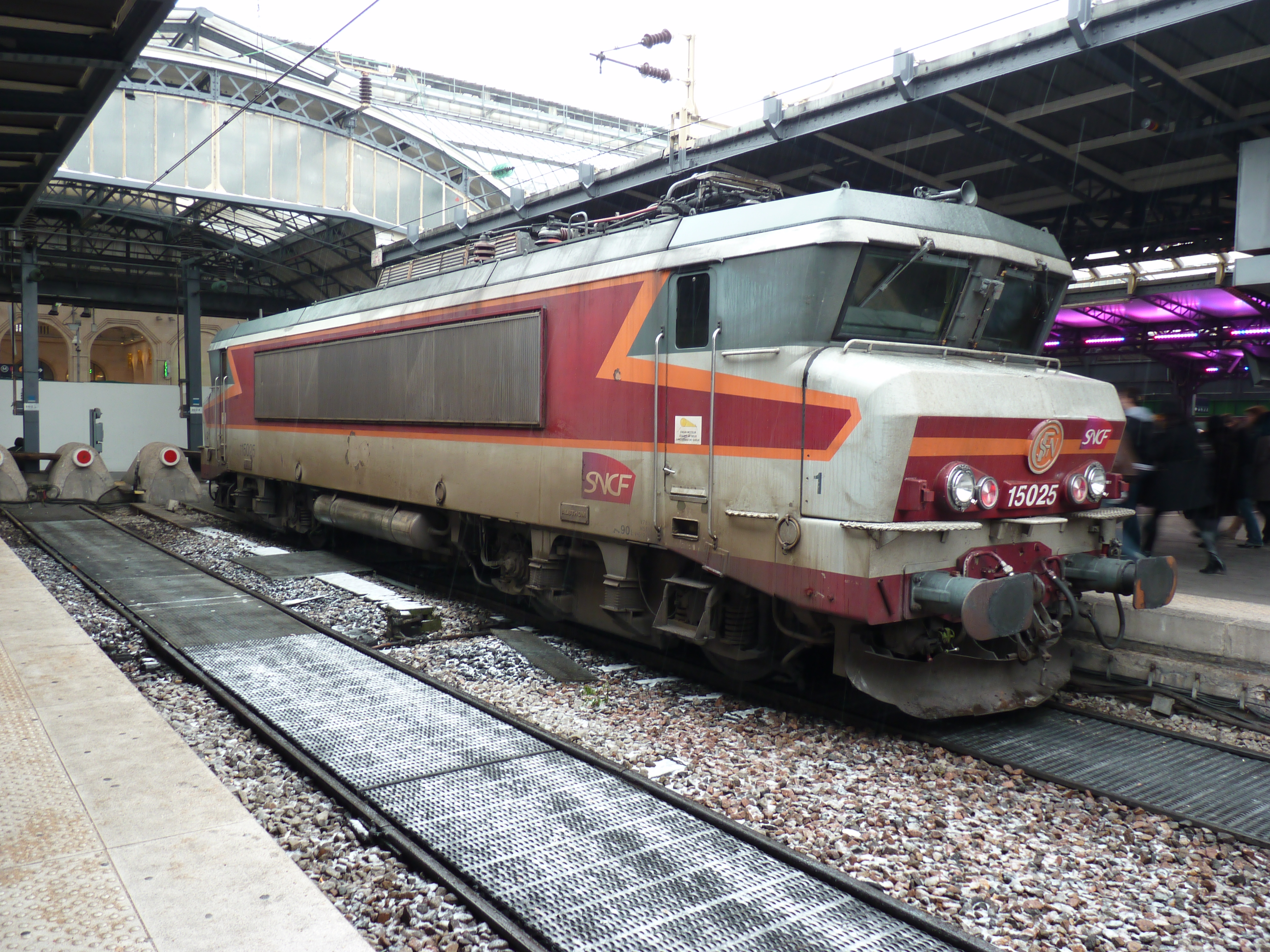 La locomotive BB 15025 en gare de Paris-Est.